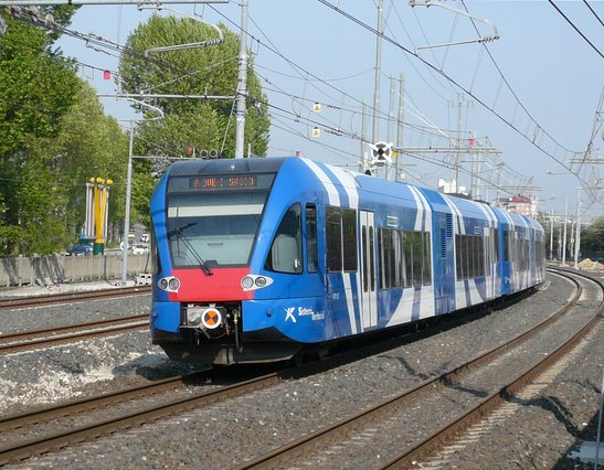 ATR 120 di Sistemi Territoriali in entrata nella stazione di Venezia Mestre